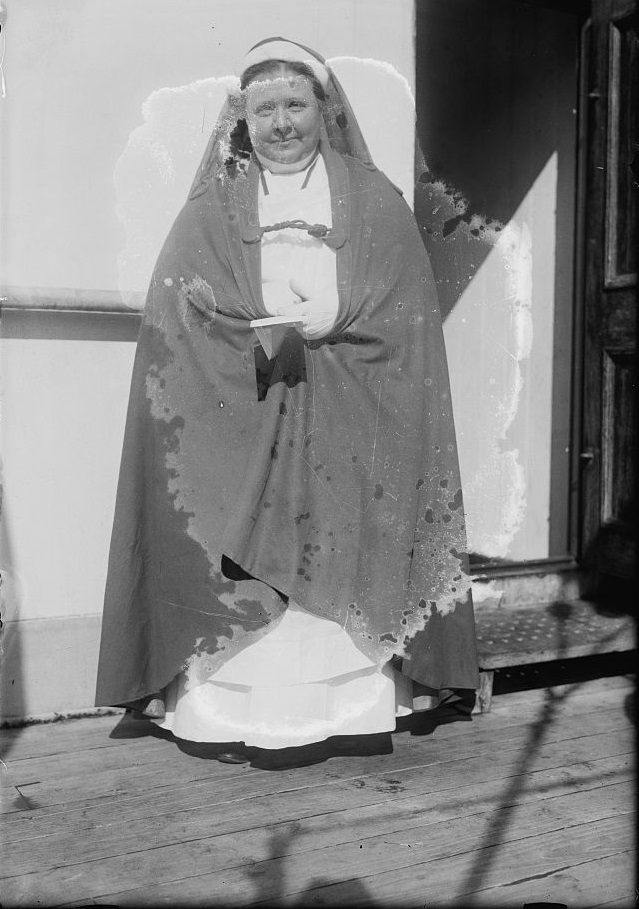 Sister Beatrice Bartlett